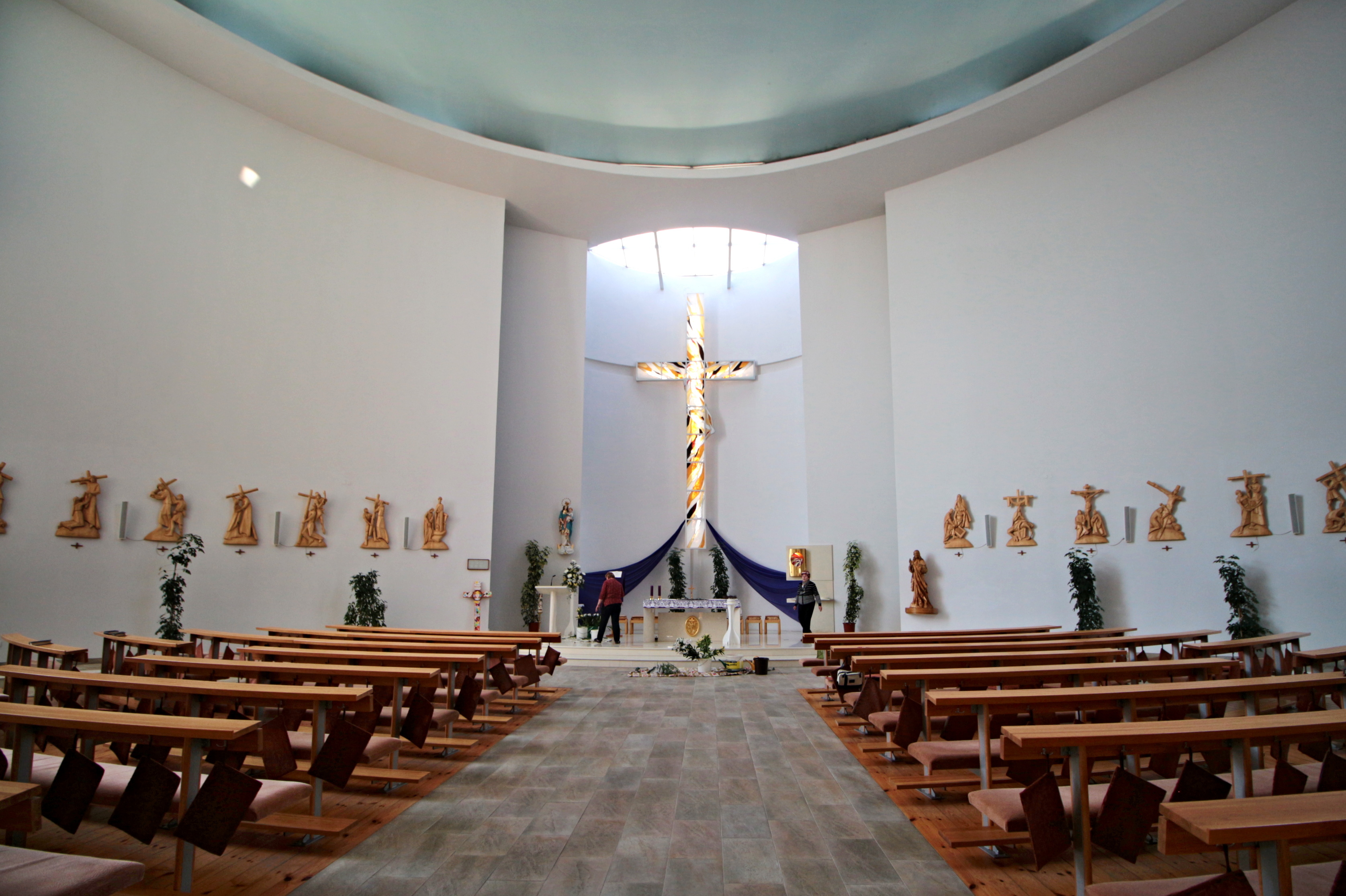 Moravský Žižkov, okres Hodonín, moderní kostel Panny Marie Vítězné